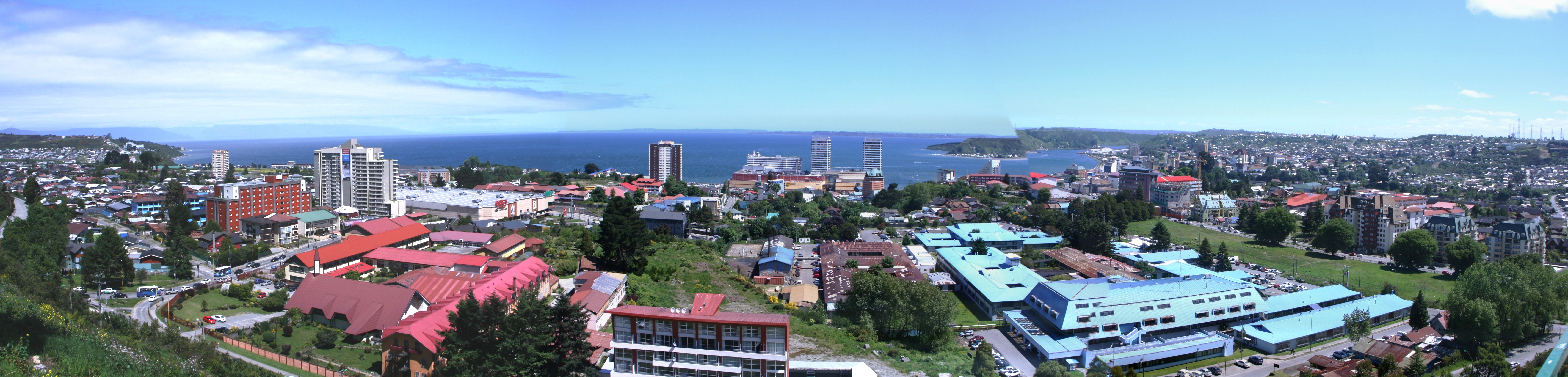 Blick vom "minimarket"